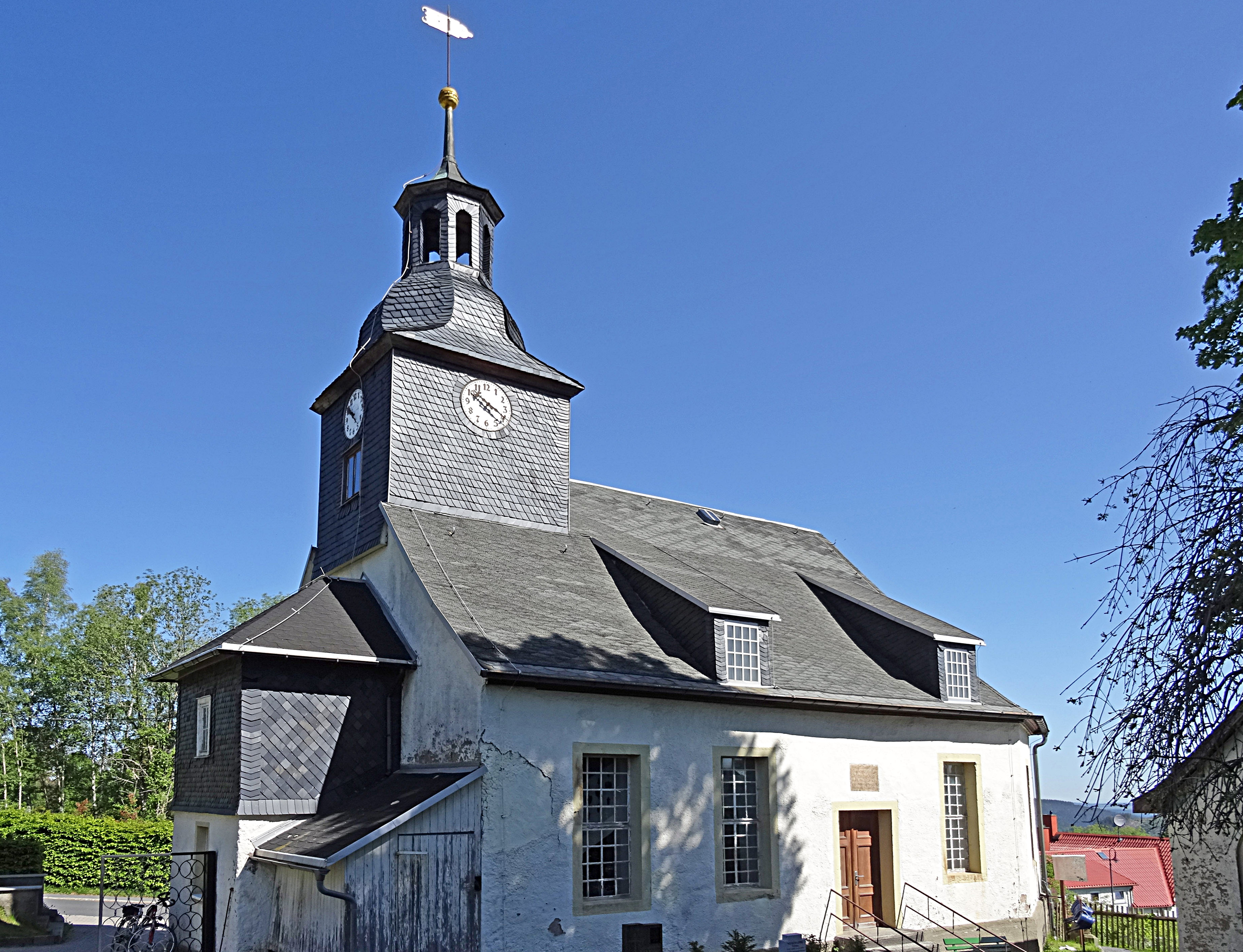 Bergkirche Gehlberg von Süden